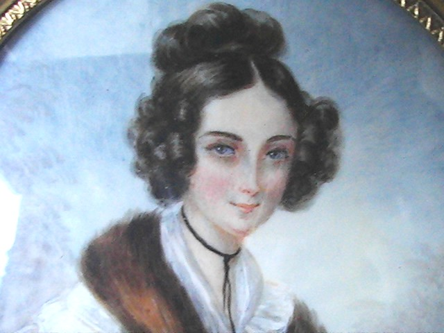 portrait de Virginie Ancelot